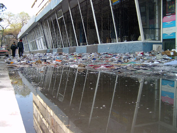 Бишкек. 28 марта 2005 года. Разграбленный магазин в центре города.